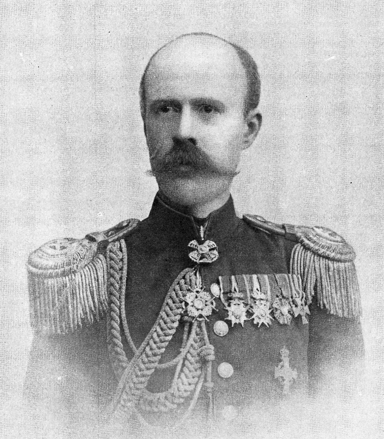 Edvard Brändström (1850-1921) på omslaget av Hvar 8 Dag 1908